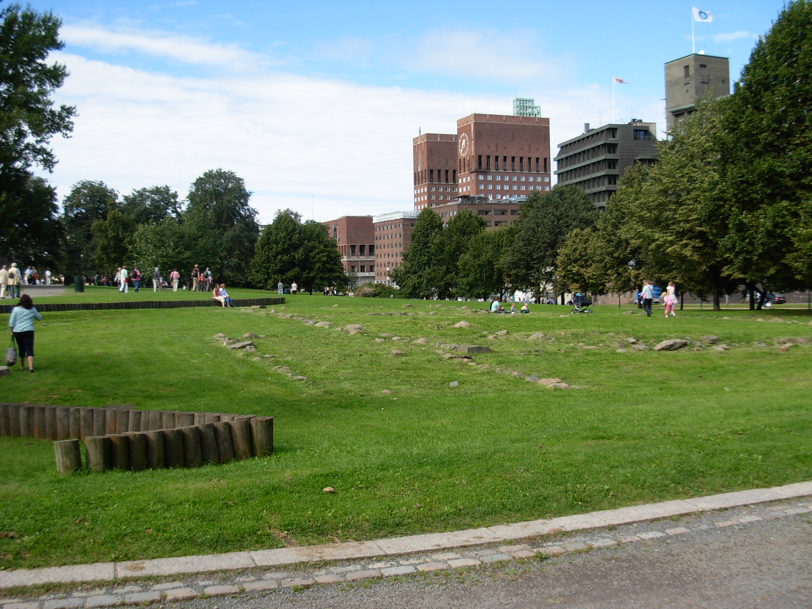 Kontraskjæret, park north of Akershus Castle,Oslo, Norway